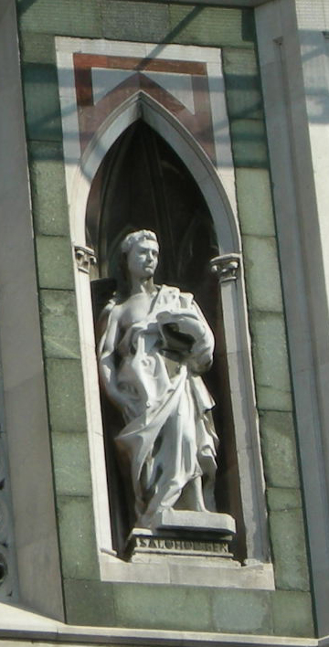 Campanile di giotto, statue donatello (copia) geremia